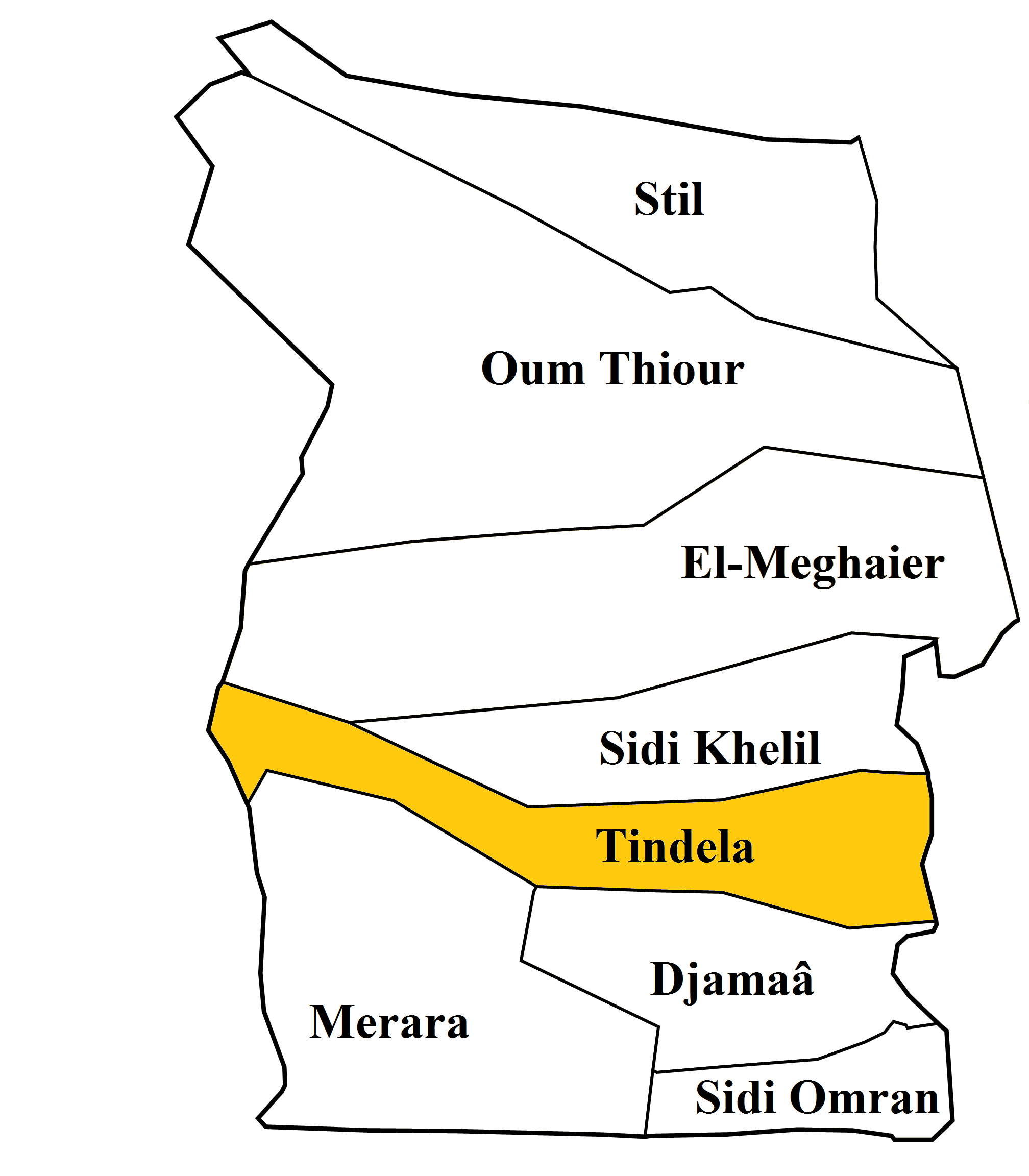 خريطة بلدية تندلة ولاية المغير الجزائرية